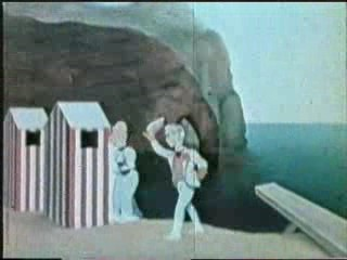 Emile Reynaud - 1895 - Autour d'une Cabine 0008